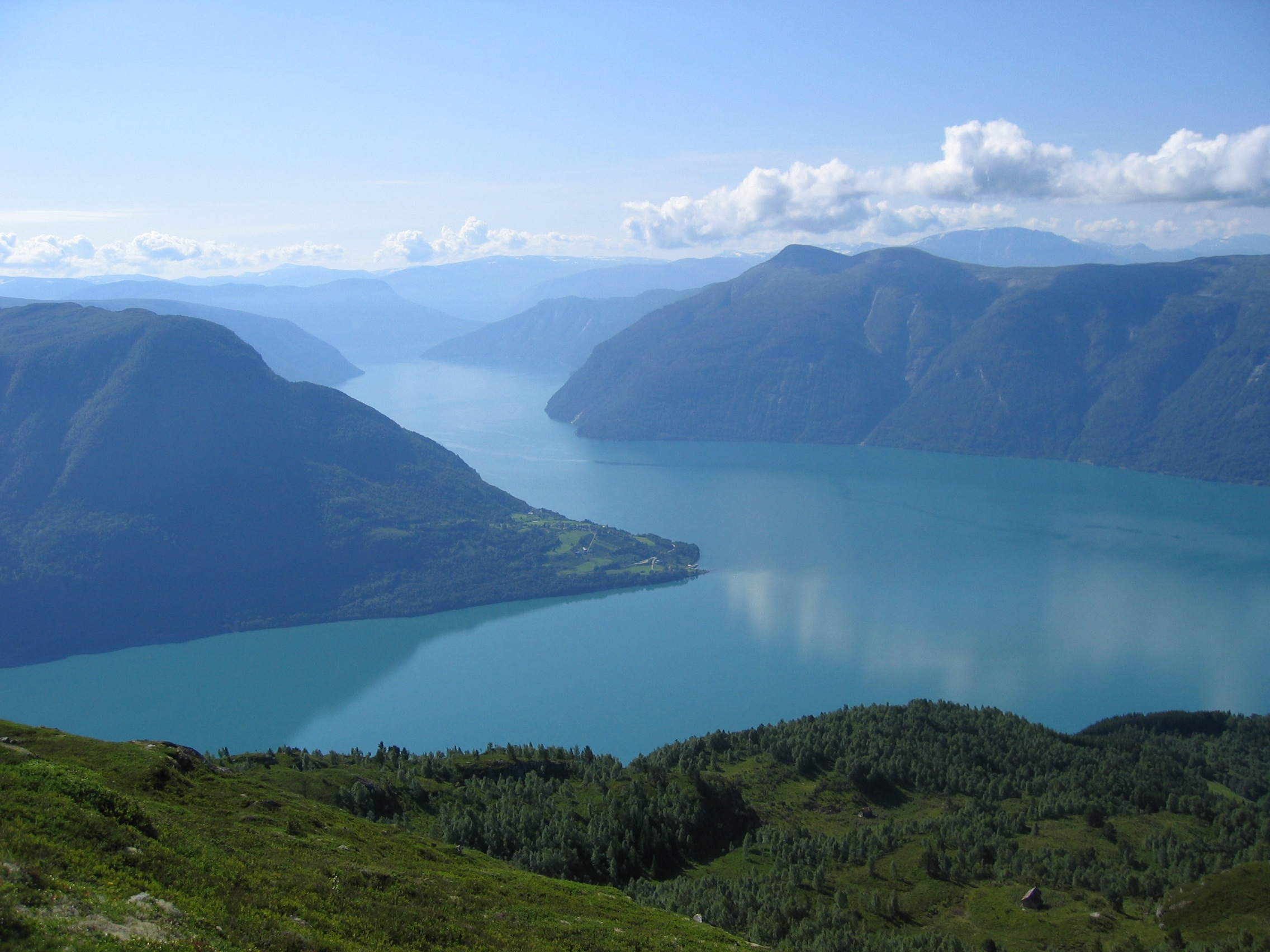 Utover Lustrafjorden. Ornes (Urnes) i midten.